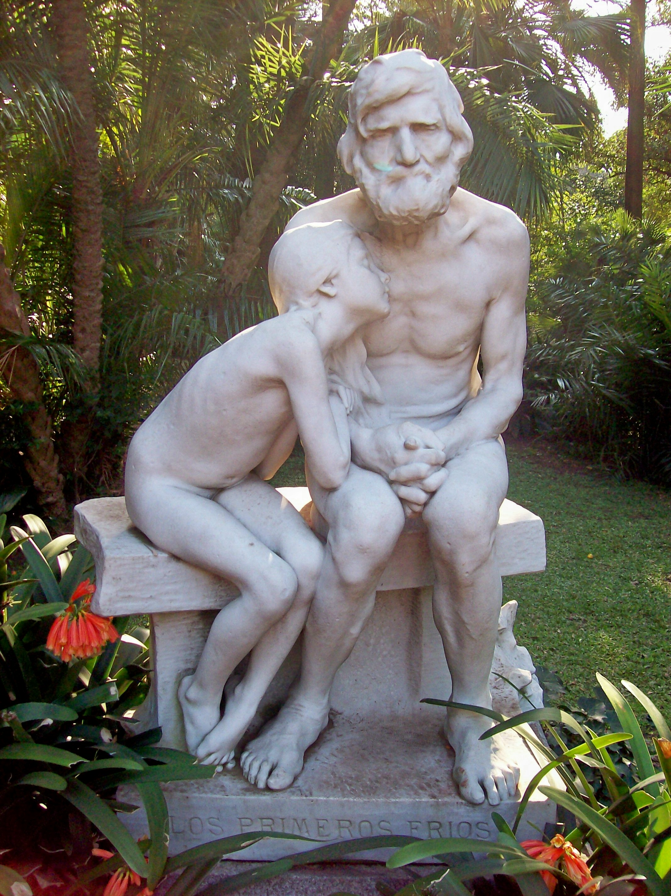 'Los primeros fríos', escultura de Miguel Blay Fábregas, Jardín Botánico de Buenos Aires.